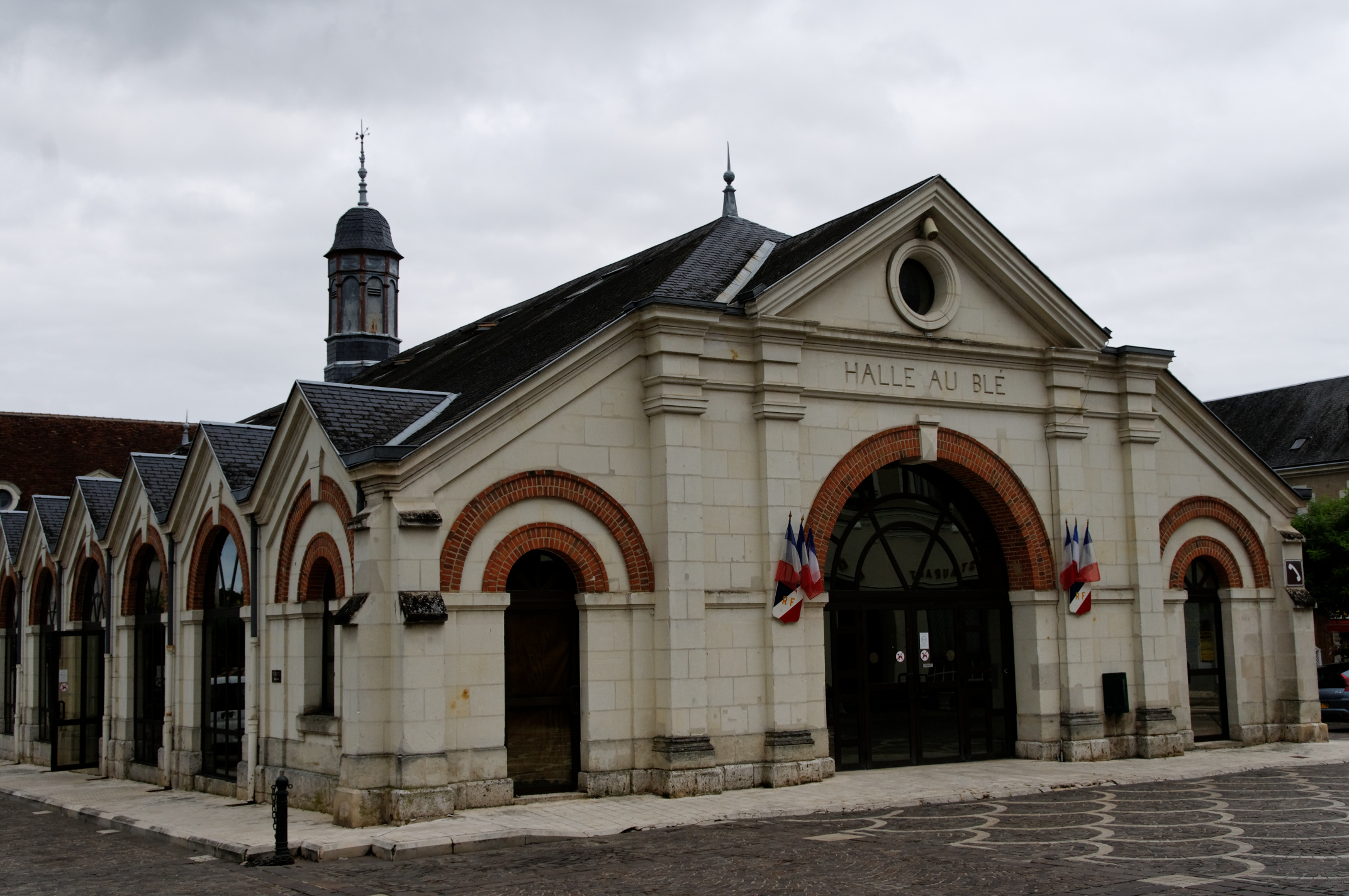 Halle au blé, Valençay, Indre, France